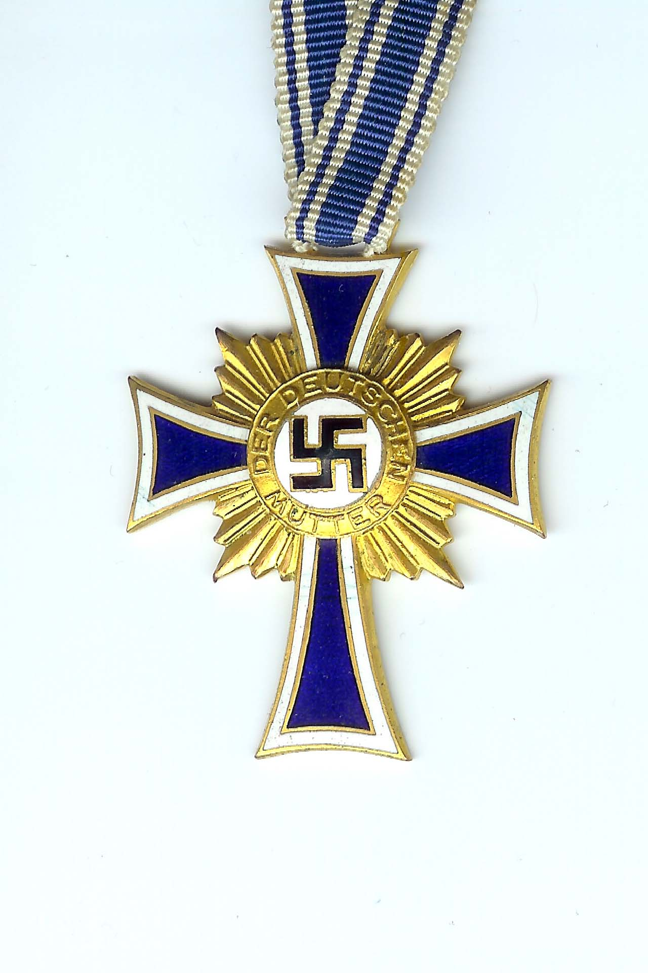 Mutterkreuz von 1938, Stufe 1, (Gold), Vorderseite